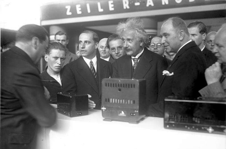 Feierliche Eröffnung der VII. grossen Funk-Ausstellung am Kaiserdamm in Berlin. Prof. Einstein besichtigt Radioapparate.